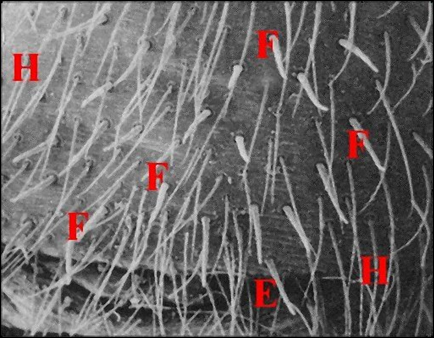 Fusules épigastriques de Nemesia caementaria vues au microscope électronique à balayage